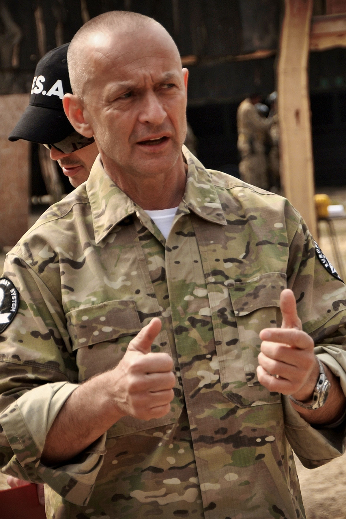 dr Andrzej Bryl podczas prowadzenia zajęć w European Security Academy